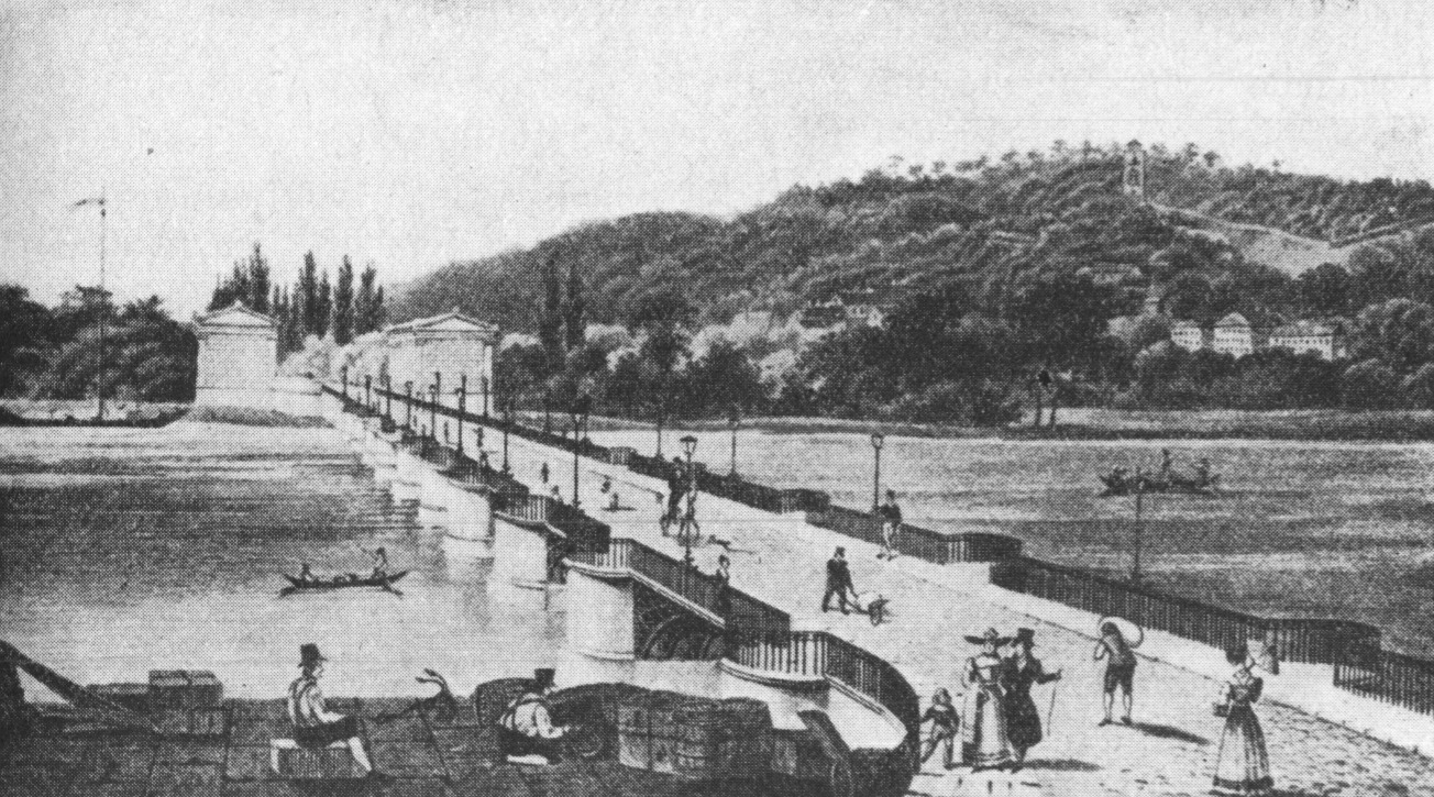 Bildunterschrift in der Brandenburgia: „Die frühere Lange Brücke von 1829 mit Teltower Tor und Brauhausberg und Belvedere. Nach einem alten Stich. Vorn links Landestelle der Dampfer der Seehandlung. Charakteristisch die Biedermeiertrachten. Hinten die 2 Gebäude des Teltower Tores.“